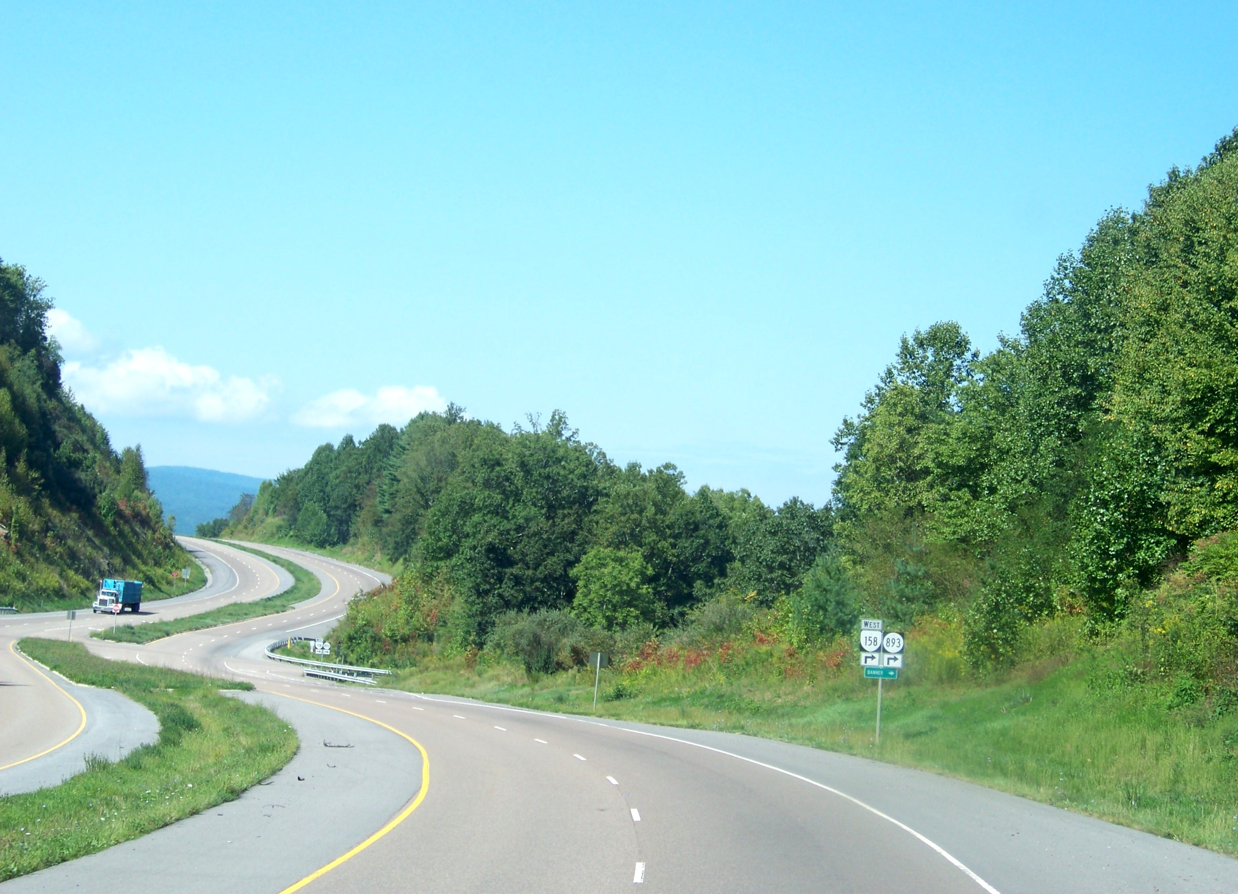 4, VA, USA